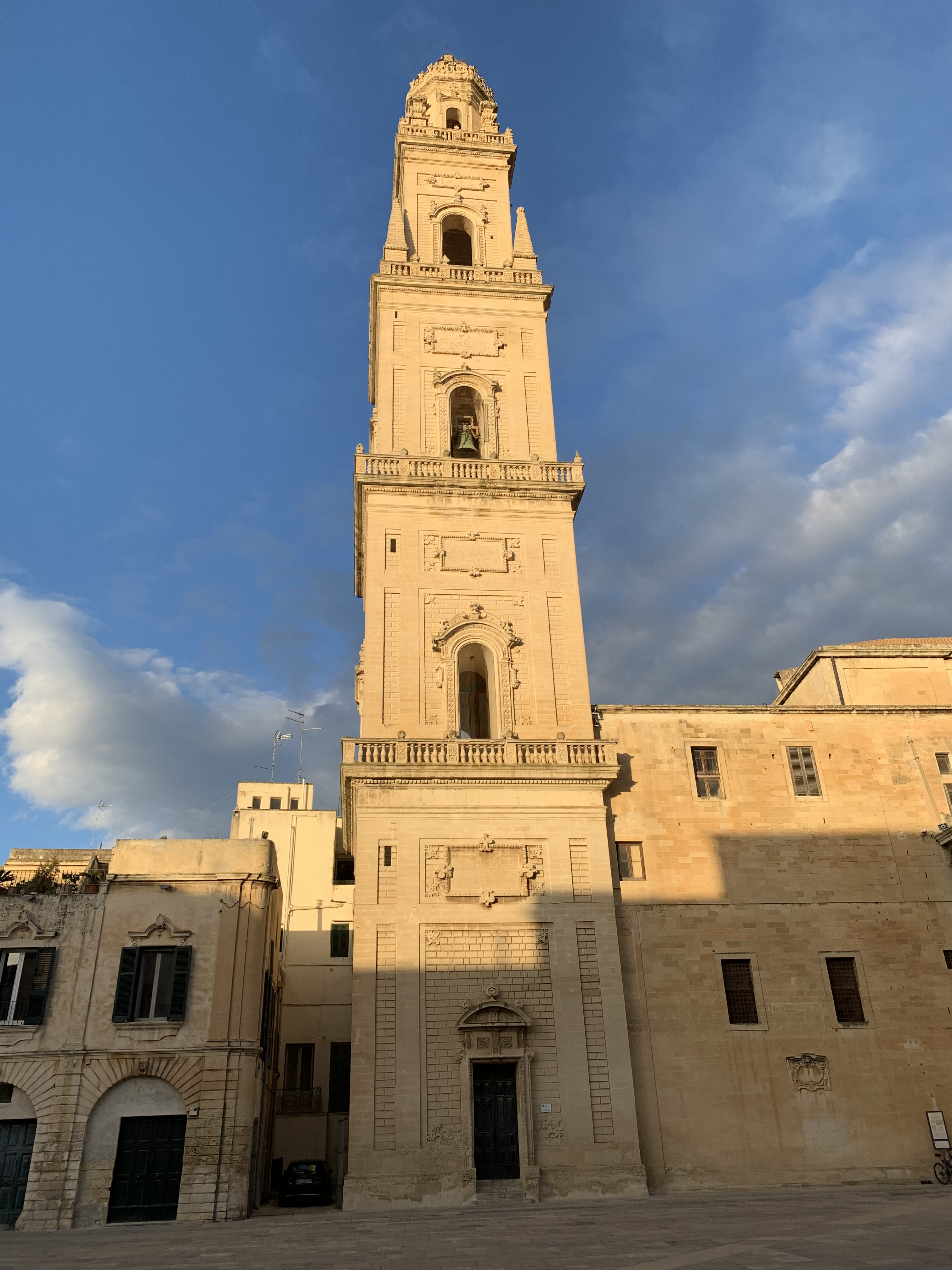 Campanile del duomo della città di Lecce.